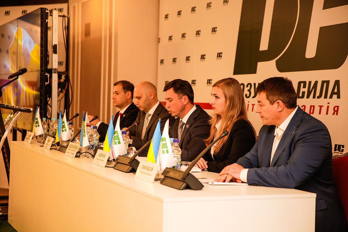 Перший з'їзд політичної партії "Розумна сила"